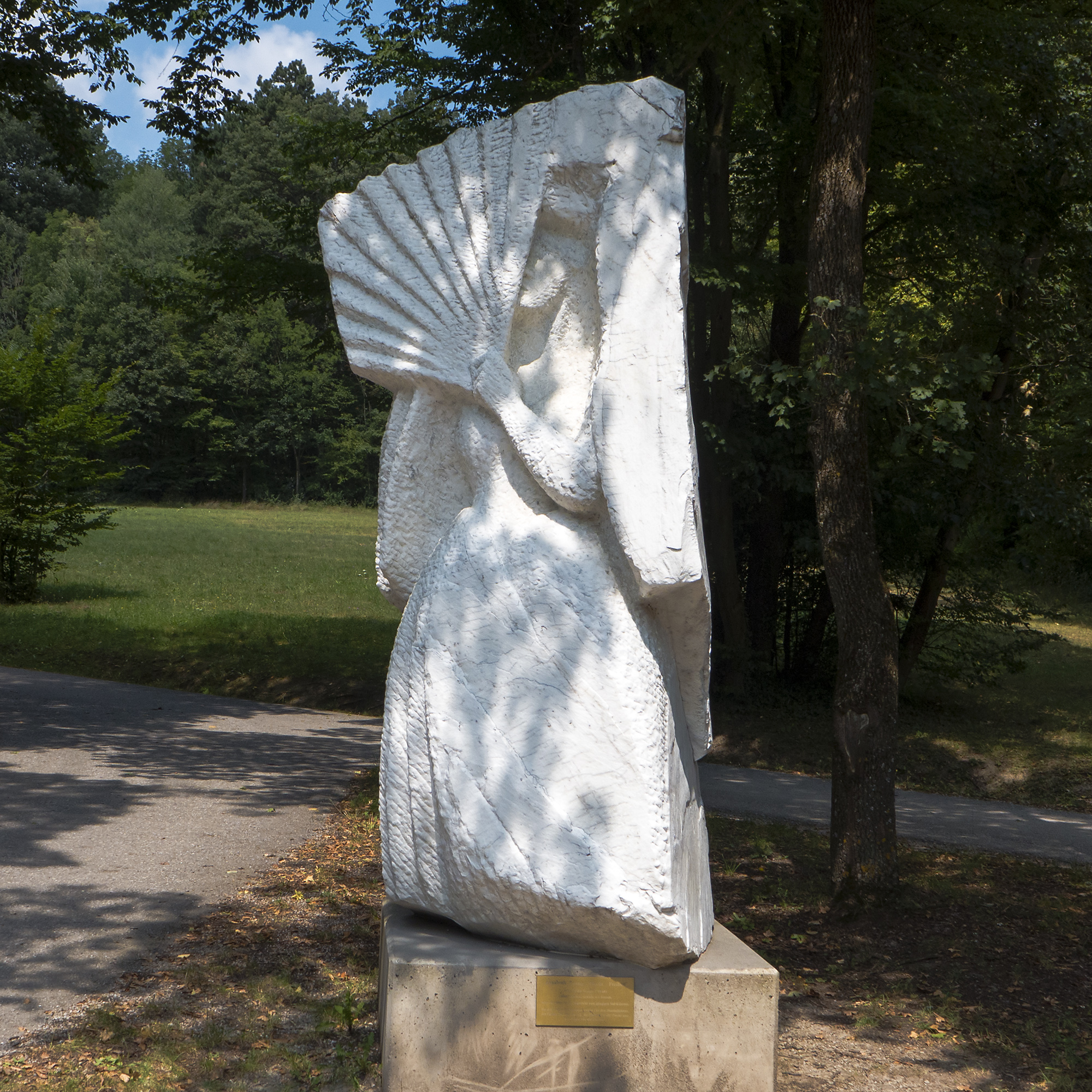 Lainzer Tiergarten in Wien 13